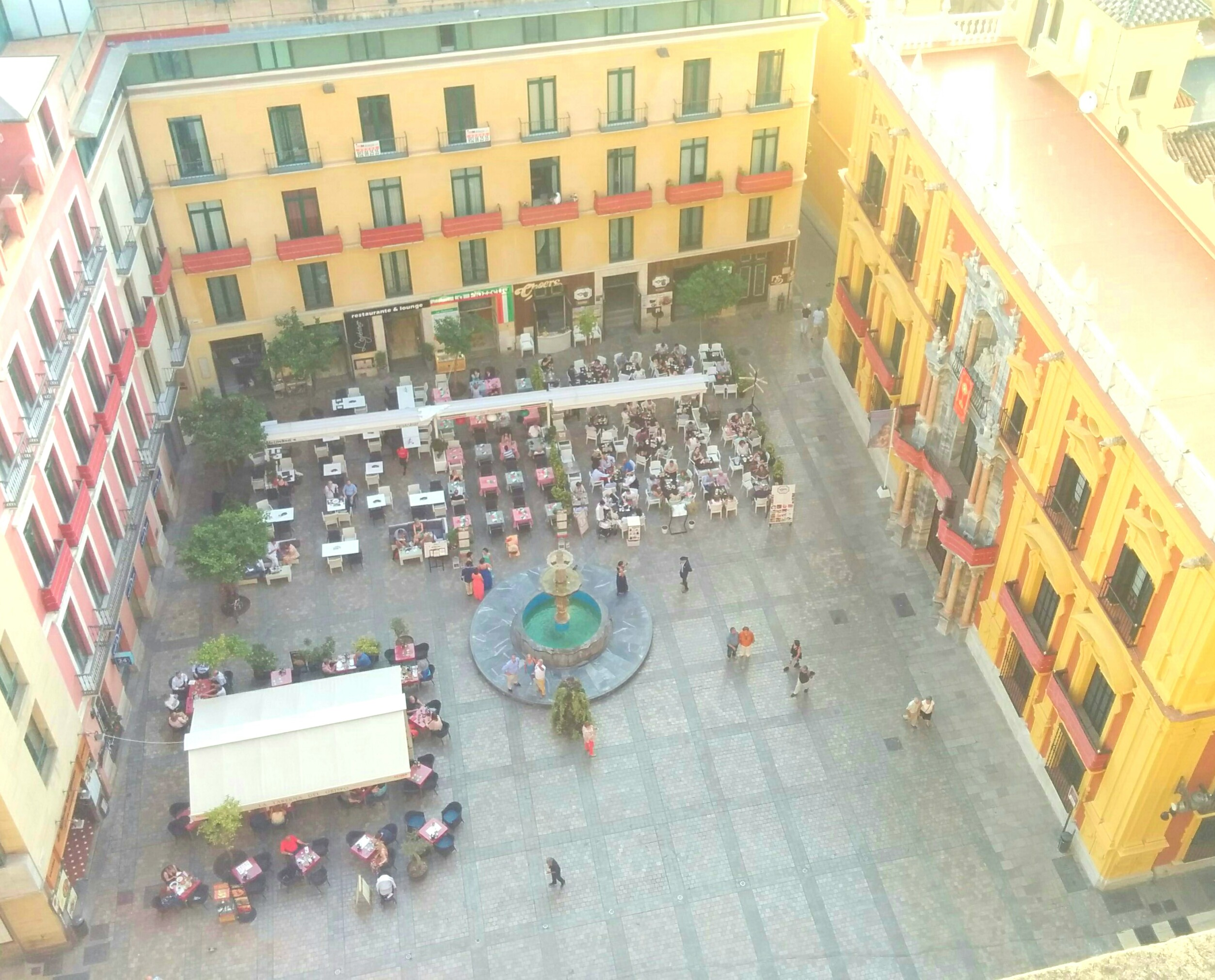 Vista panorámica de la Plaza del Obispo en Málaga